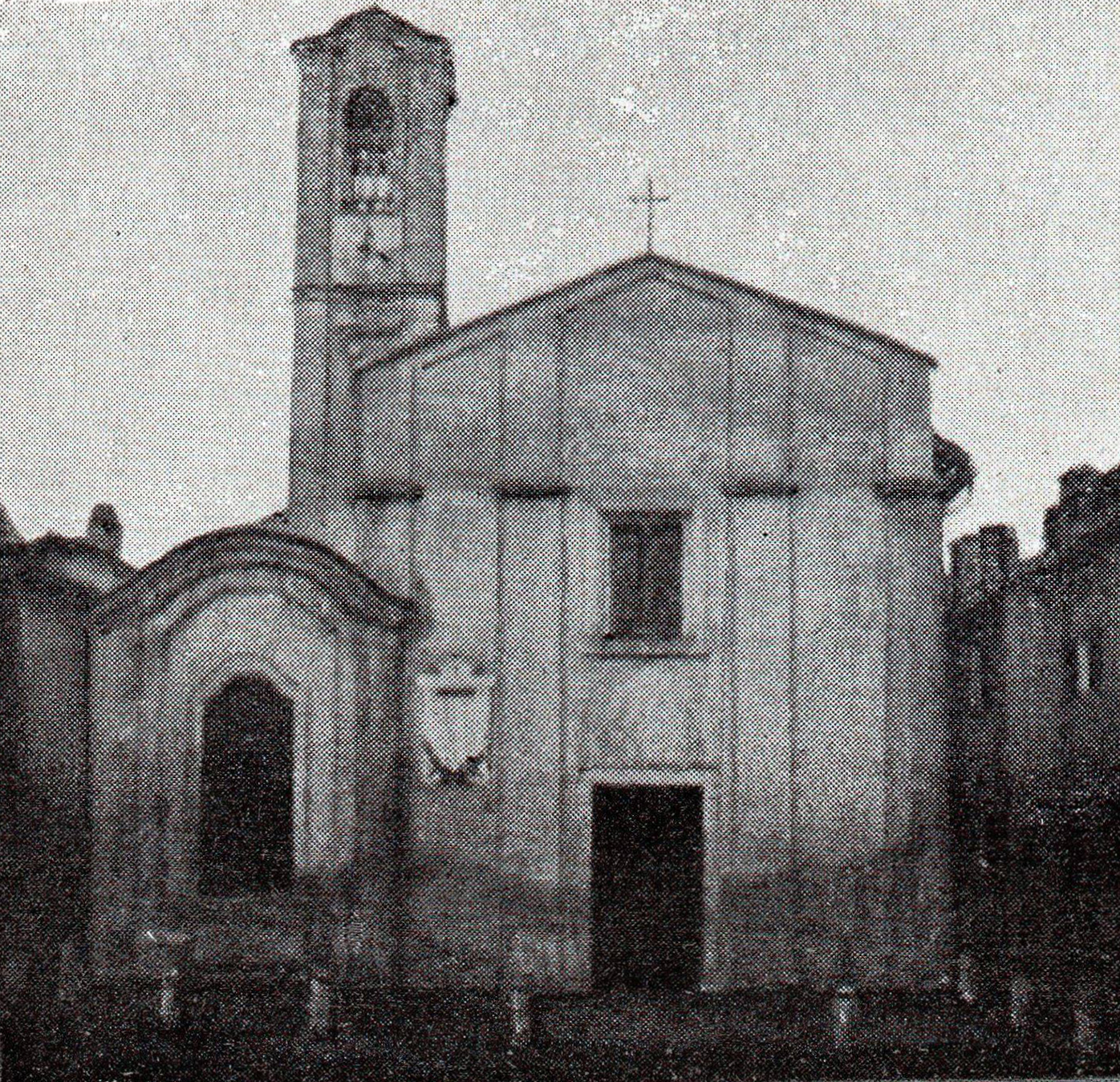 L'antico oratorio di San Giuseppe, oggi demolito, sito in località Buon Gesù a Olgiate Olona.